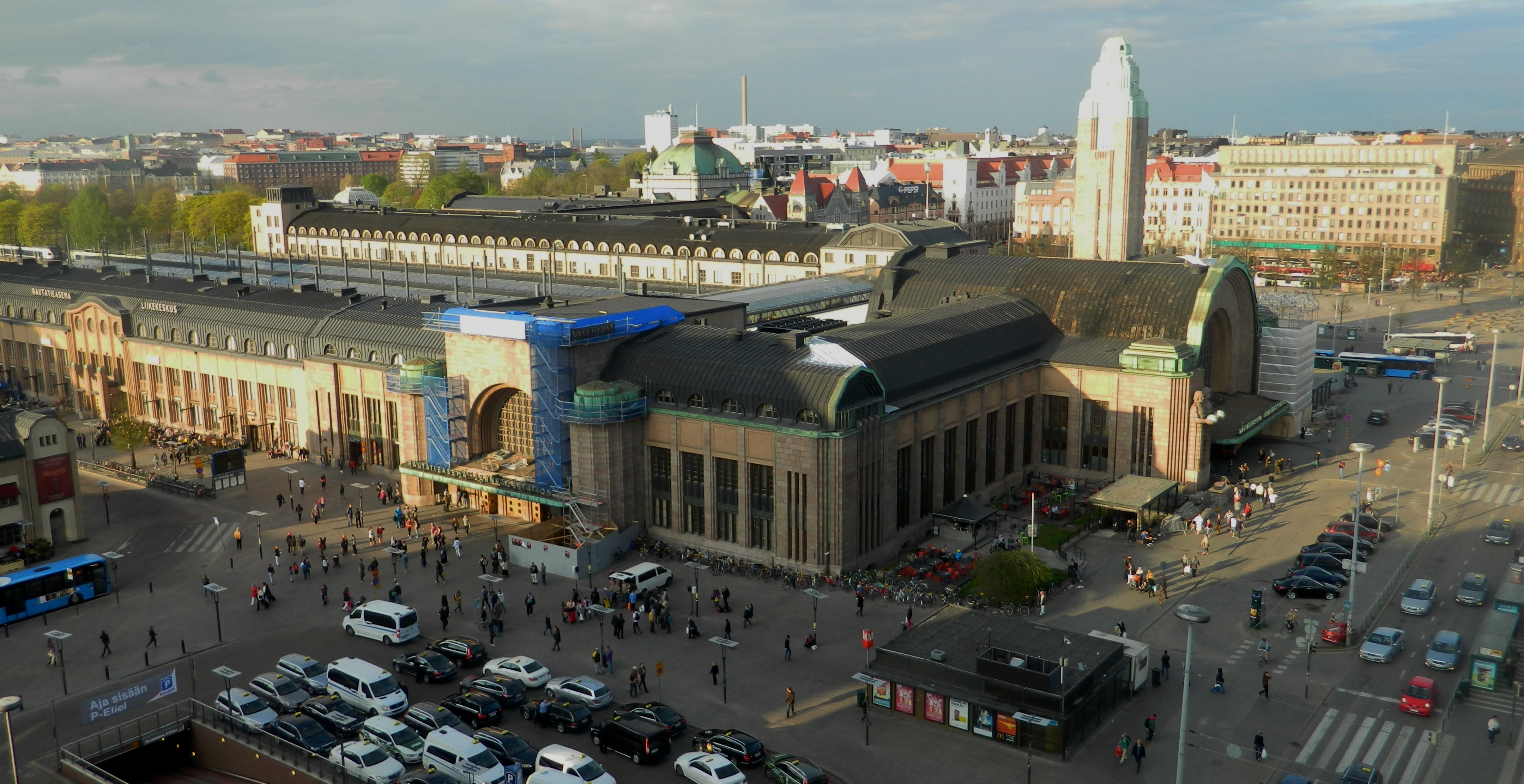 Helsingin rautatieasema Sokos Hotellista kuvattuna